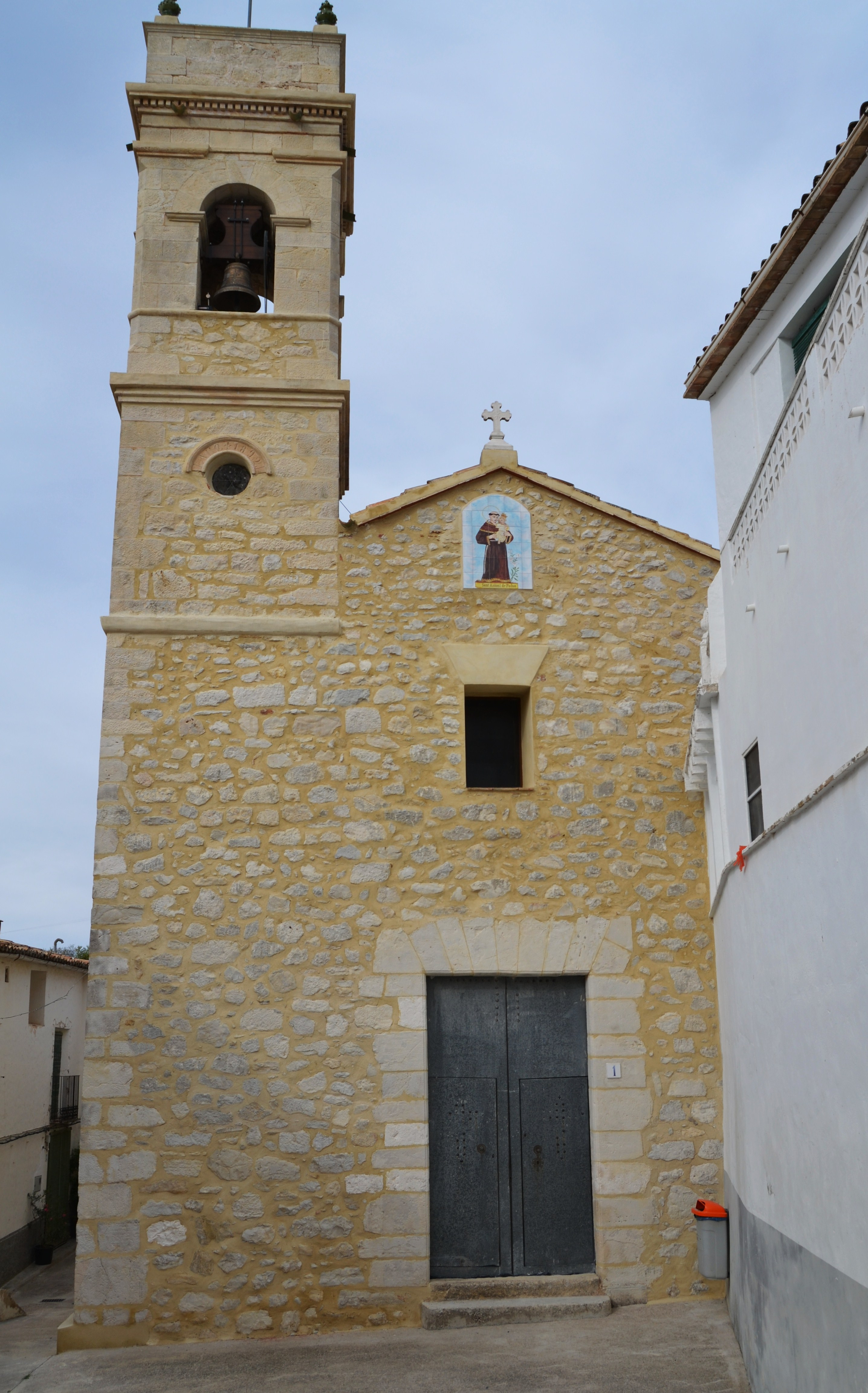 Tollos - església de sant Antoni de Pàdua.